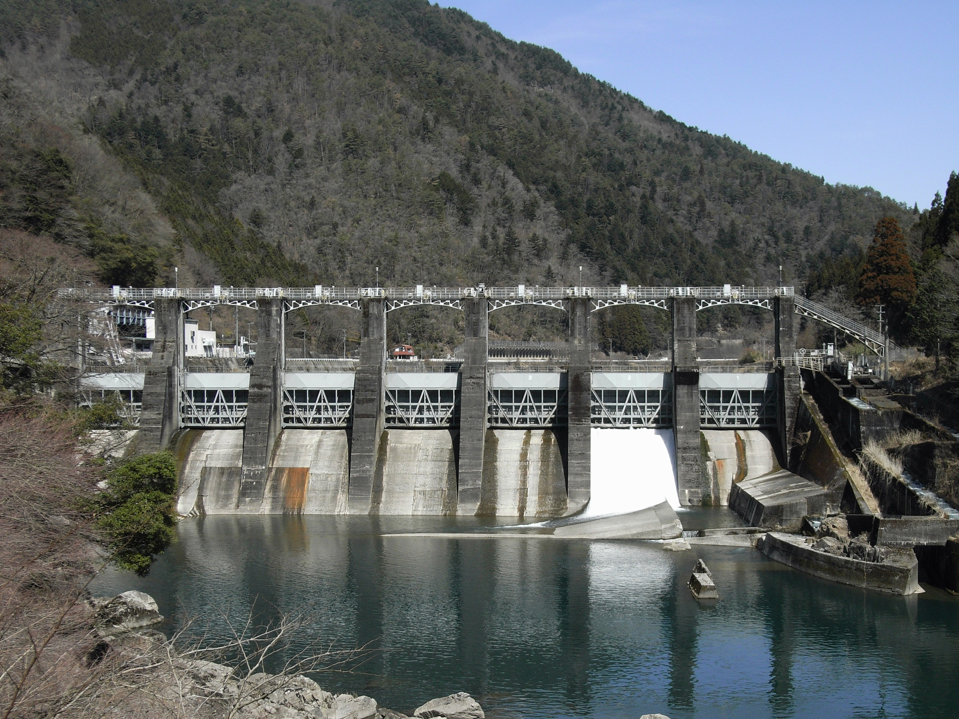 Dam